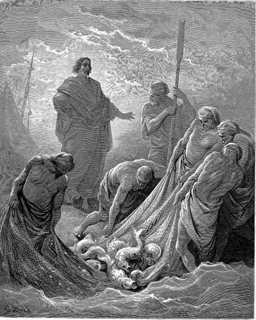 La pêche miraculeuse citée dans la Bible, d'après l'œuvre de Gustave Doré.